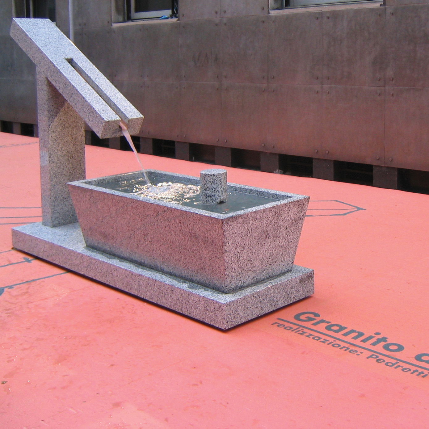 Fontana in Tonalite dell'Adamello, realizzata nel 2003, come esemplare unico, da Ettore Sottsass